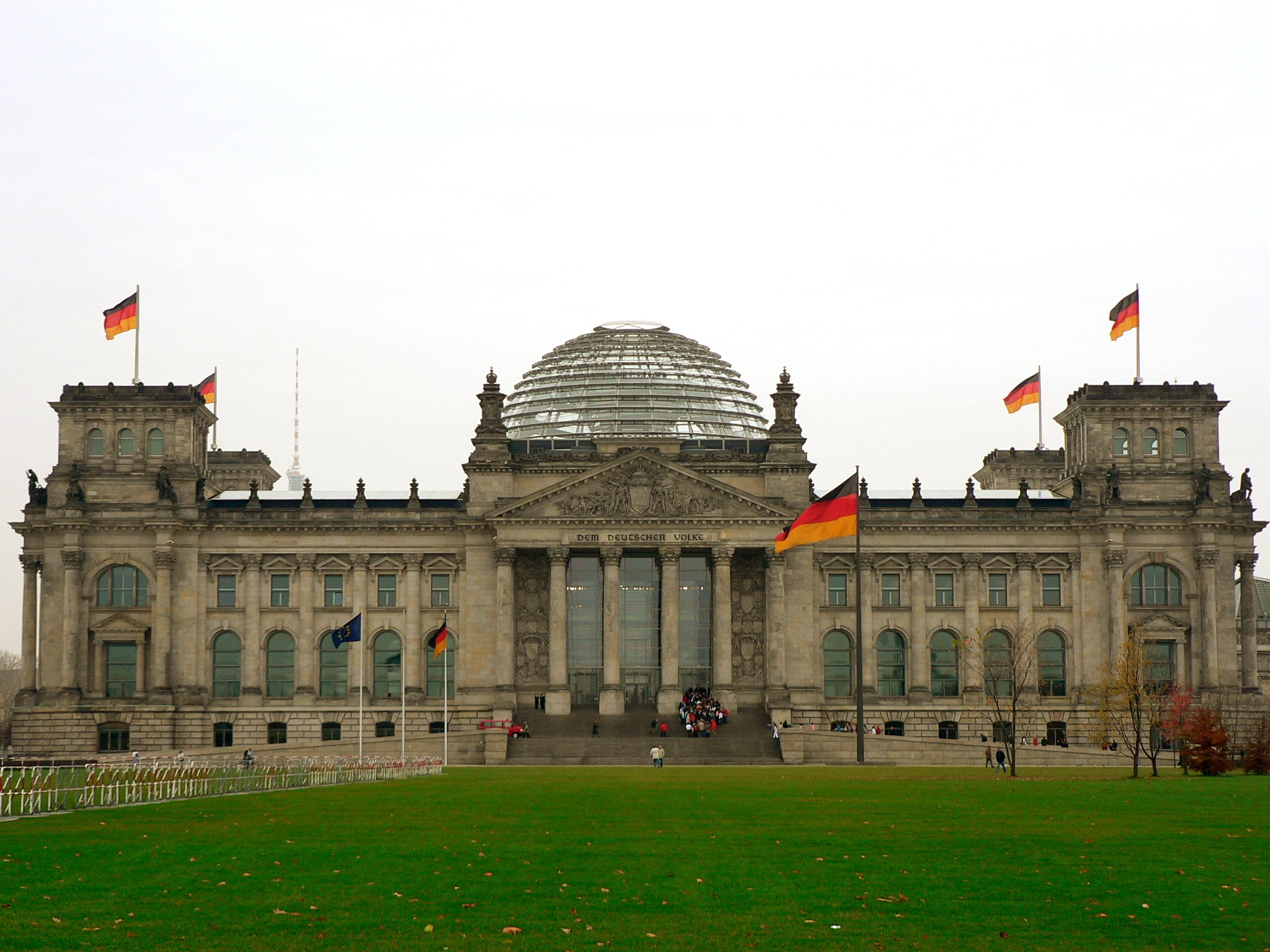 Reichstag, Berlin Author: Wojsyl, 2005